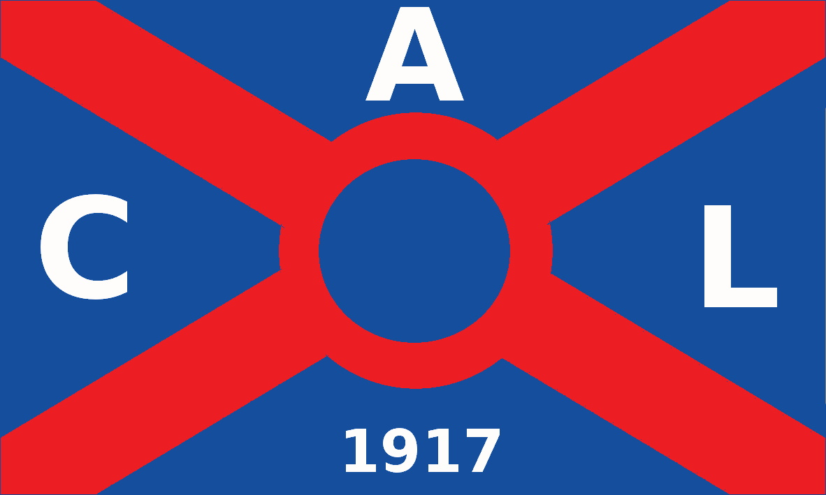 Bandera del desaparecido equipo uruguayo de fútbol Club Atlético Lito